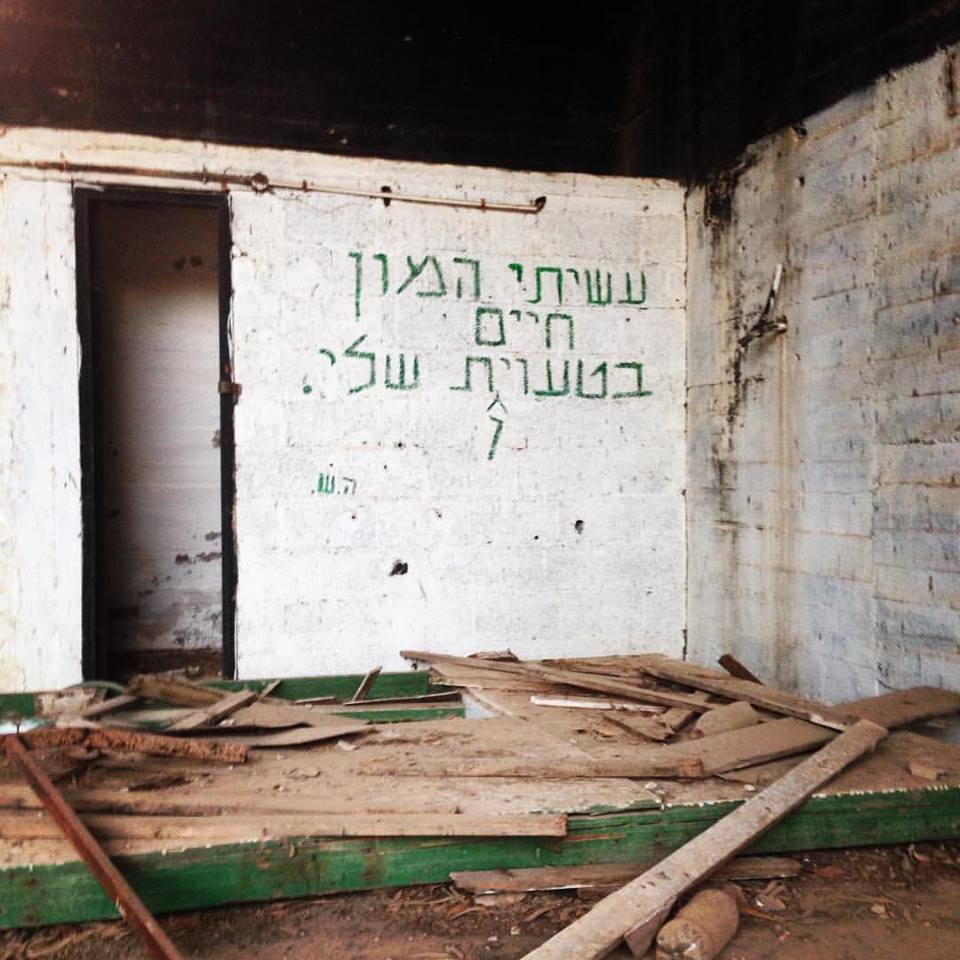 כיתוב הקיר "עשיתי המון חיים בטעויות שלי" אשר פתח את פרויקט #הלהשלגכותבתלקיר של היוצרת הלה שלג